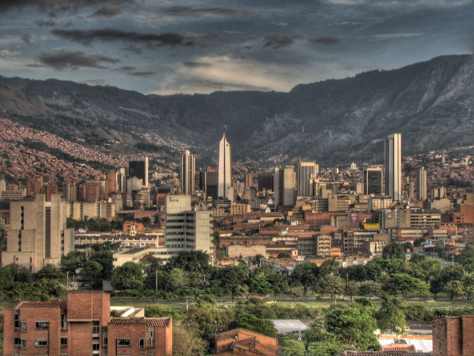 Medellin, Columbia.